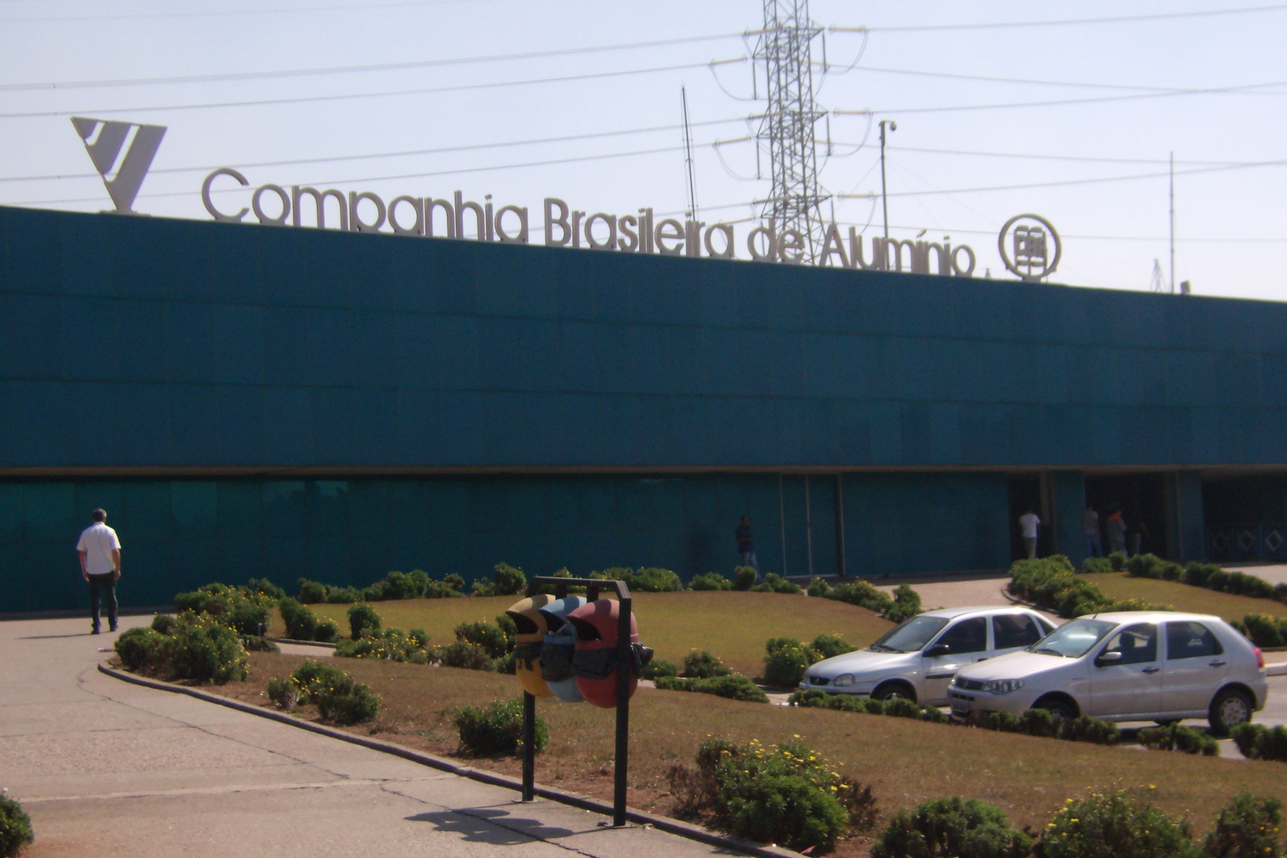 A Companhia Brasileira de Alumínio (CBA) é uma das maiores companhias de alumínio do Brasil. Fundada em 1941, pertence ao Grupo Votorantim e está localizada na cidade de Alumínio. Fonte: Wikipédia